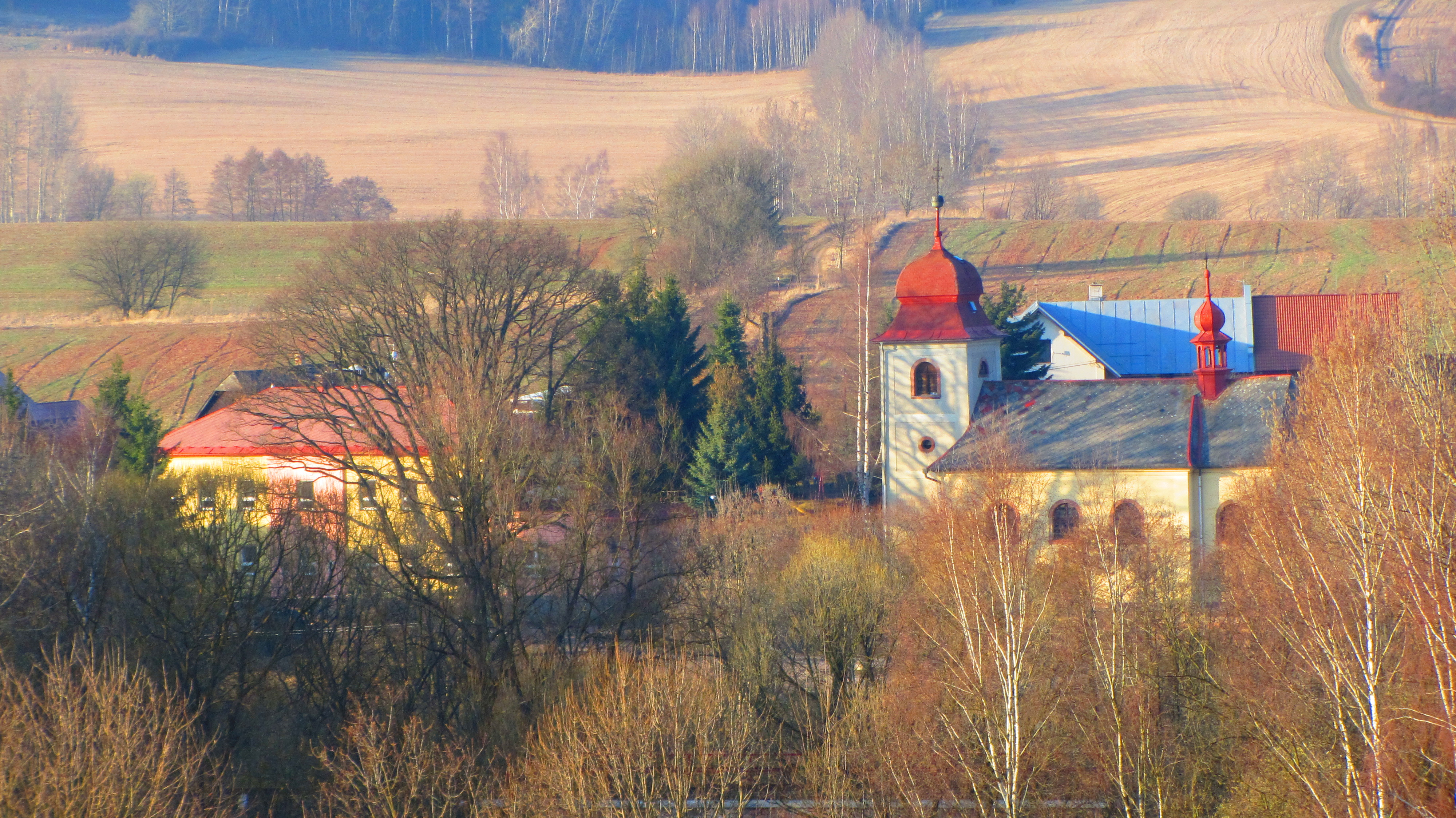 Pohled na střed obce Borovnice s kostelem sv. Víta